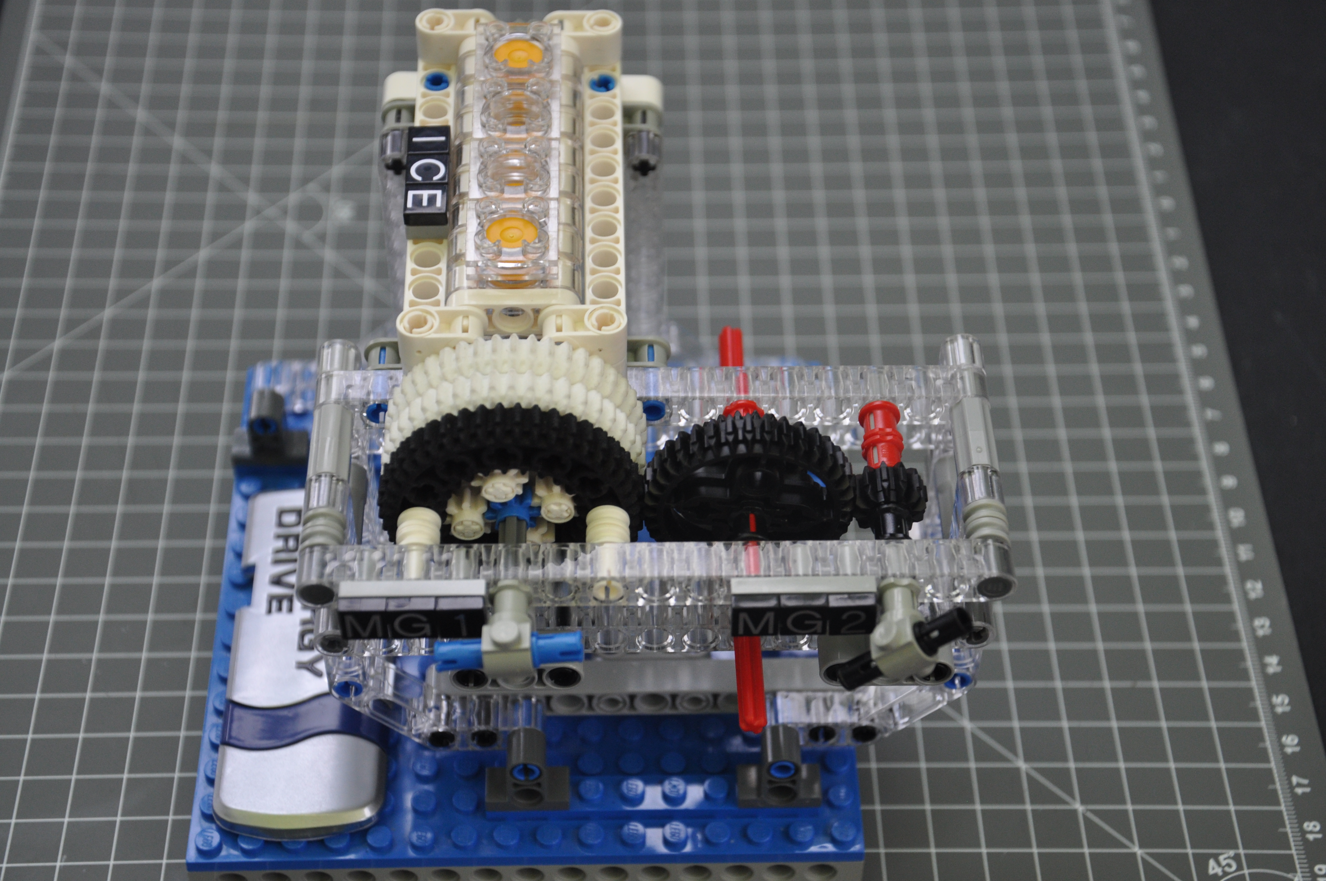 Nachbildung des vollständigen Antriebsstrang des Toyota Prius 4 (XW50). Beim Toyota Hybridantrieb wird der Verbrennungsmotor (ICE - internal combustion engine; beim Prius 4 72 kW) durch einen Elektromotor (MG2 - Motor-Generator, hier 53 kw) unterstützt. Ein weiterer Elektromotor (MG 1, hier 23 kW) dient überwiegend als Generator. Das Power Split Device (PSD) genannte Planetengetriebe kann dank der drei Motoren die Übersetzung zwischen ICE und Achsantrieb stufenlos steuern. Eine Kupplung ist nicht erforderlich. Wie das genau funktioniert wird im Priuswiki erklärt: Zudem gibt es eine Demo zum Spielen: Das Vorbild im Detail: Der Planetenring sowie das große Zahnrad stammen von Shapeways